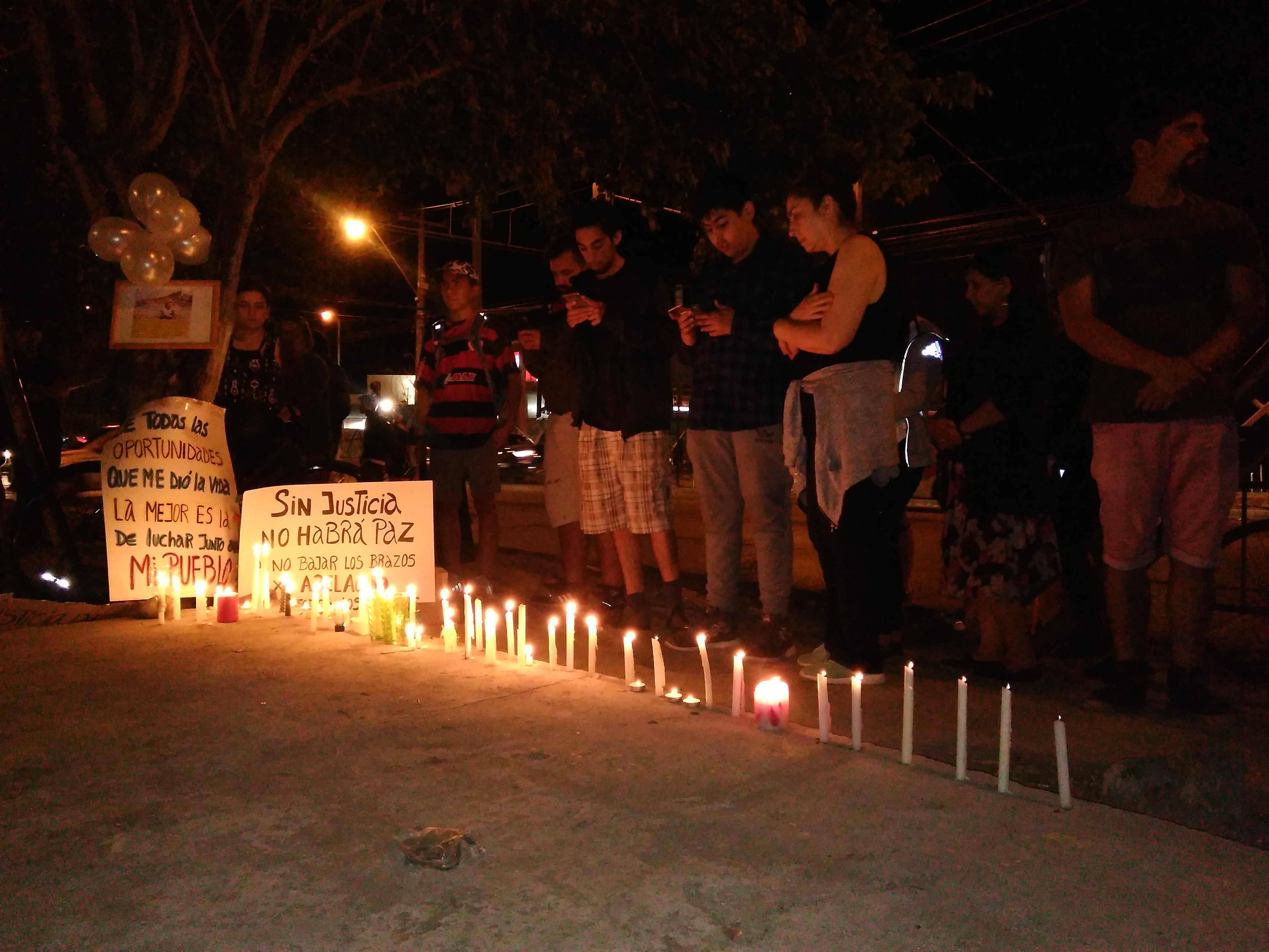 Velatón realizada en villa Los Héroes de Maipú (Parque Tres Poniente) por el asesinato del joven Abel Acuña durante las protestas de Chile de 2019.